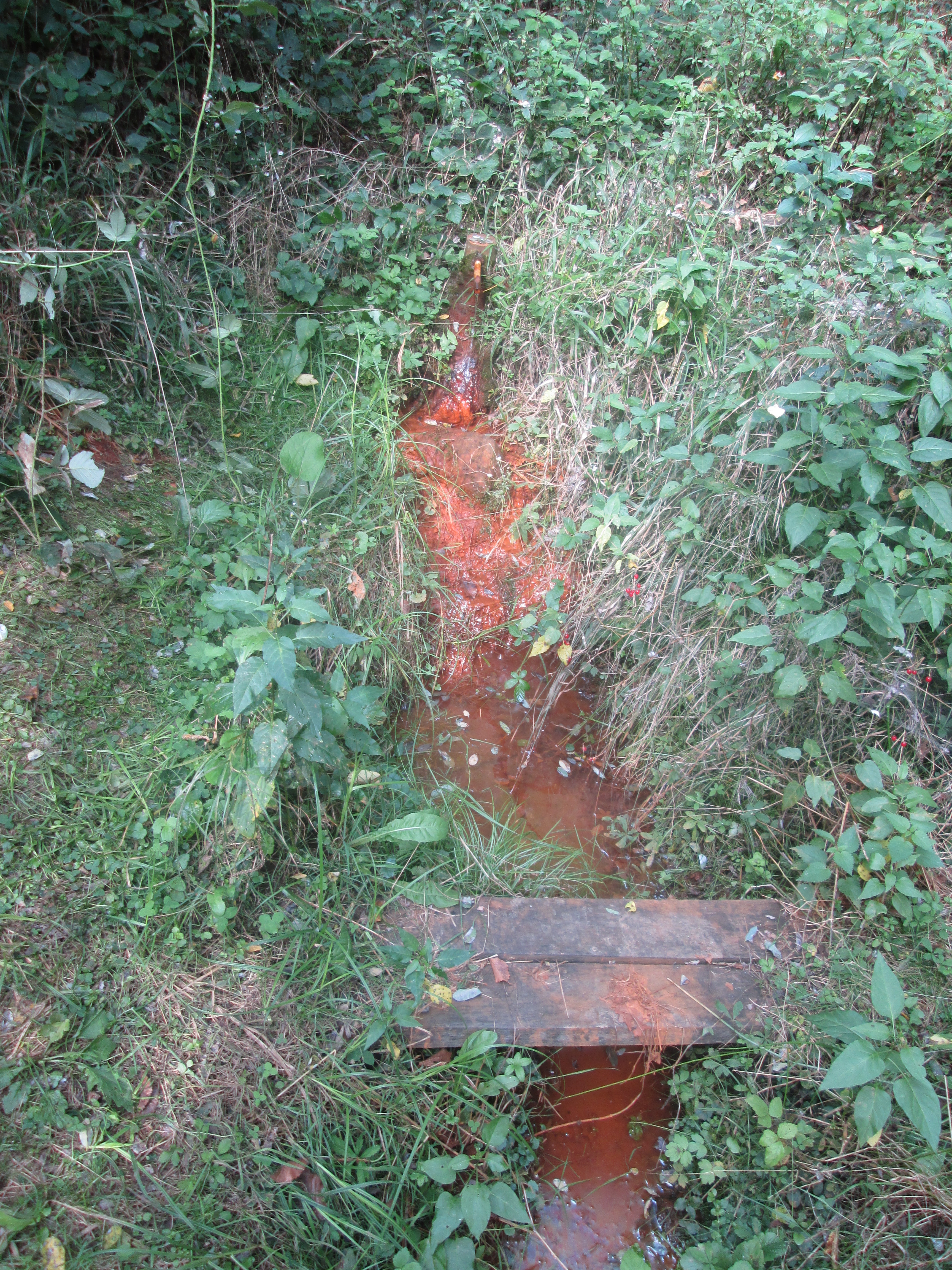 Српски (ћирилица): Први извор Саставци у Мирашевачкој бањи